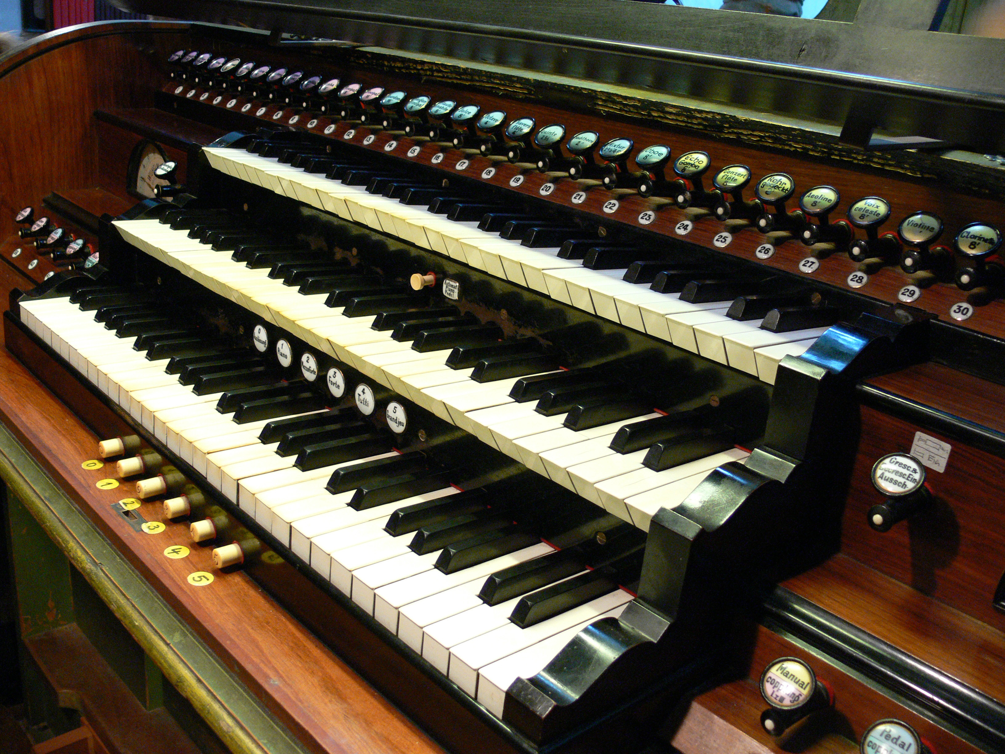 Schwarz-Orgel von 1900/1901: Spieltisch Salemer Münster, Germany